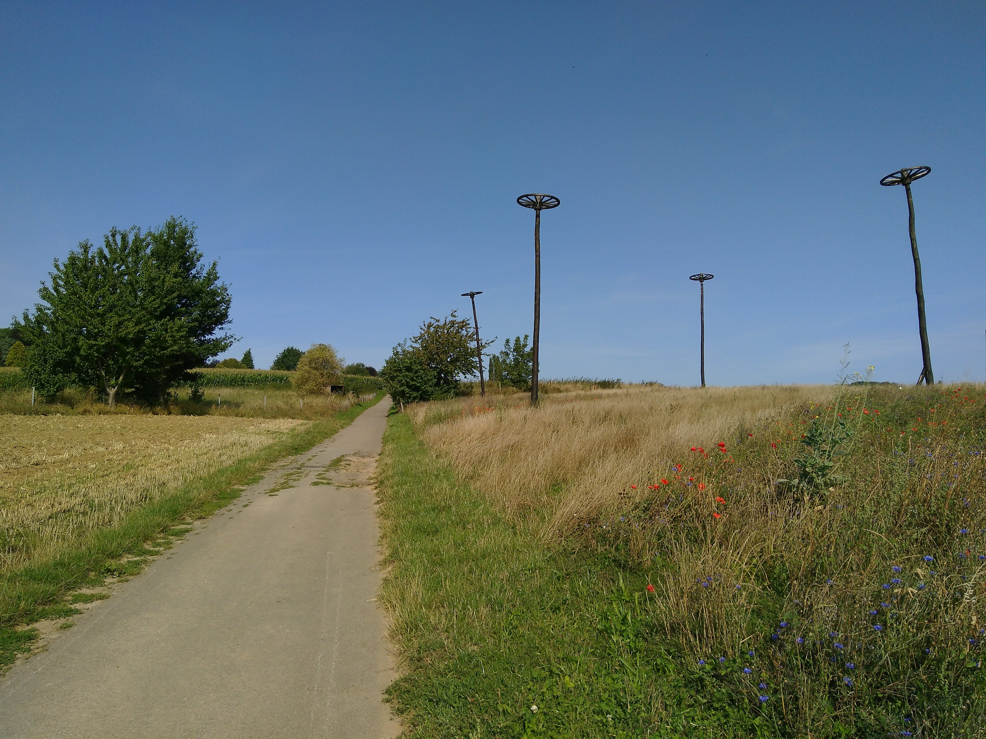 Werk van Bas Smets